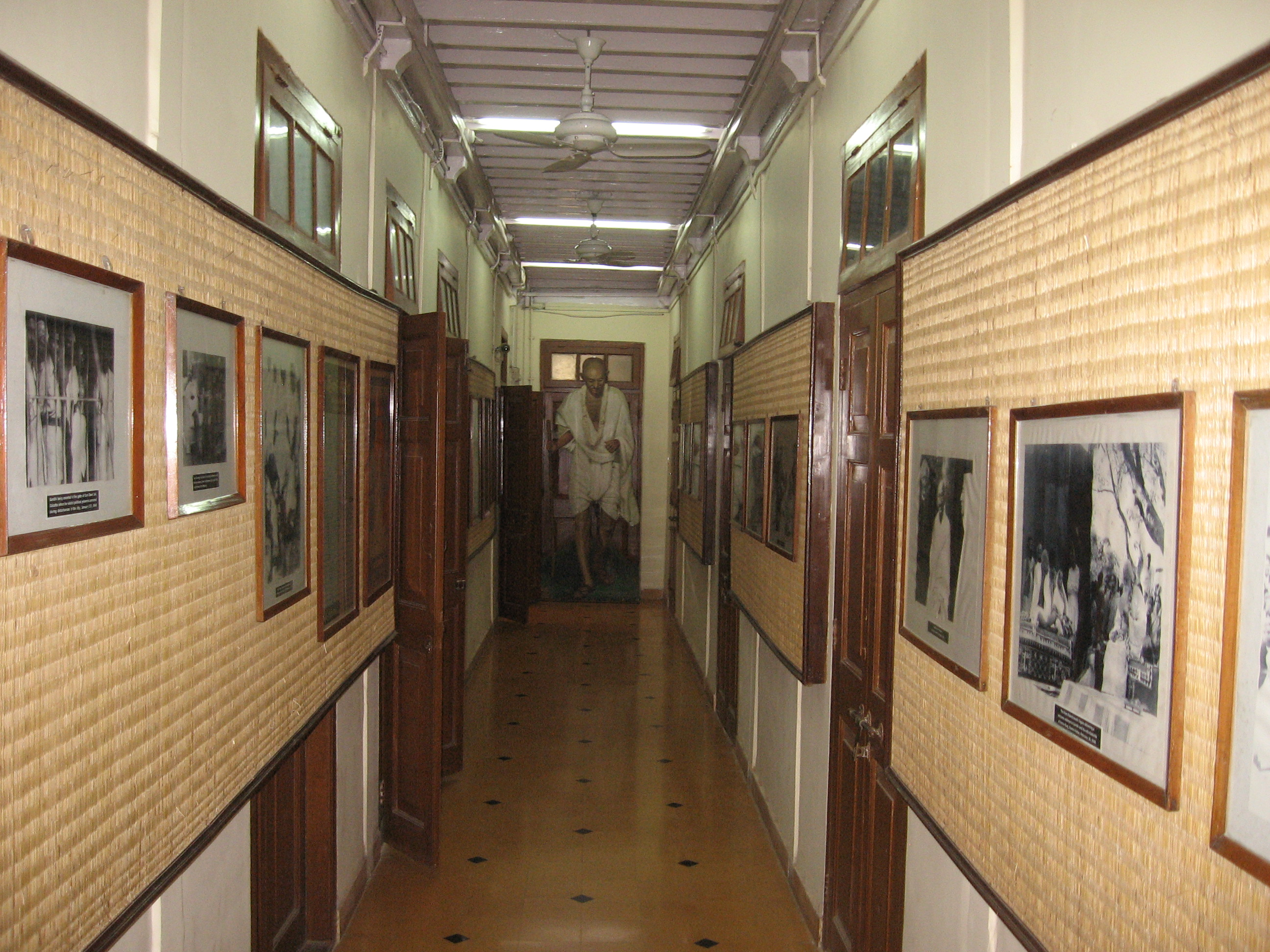 Mani Bhavan in Mumbai